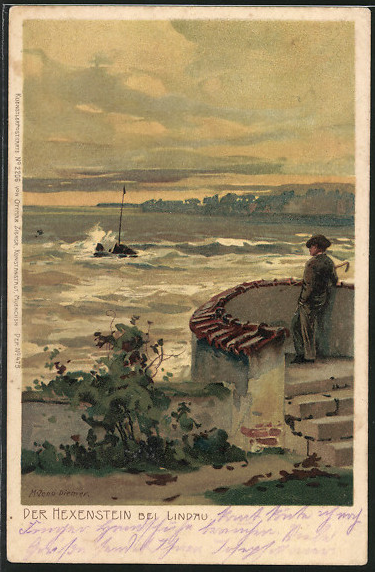 Hexenstein (Findling) bei Lindau im Bodensee